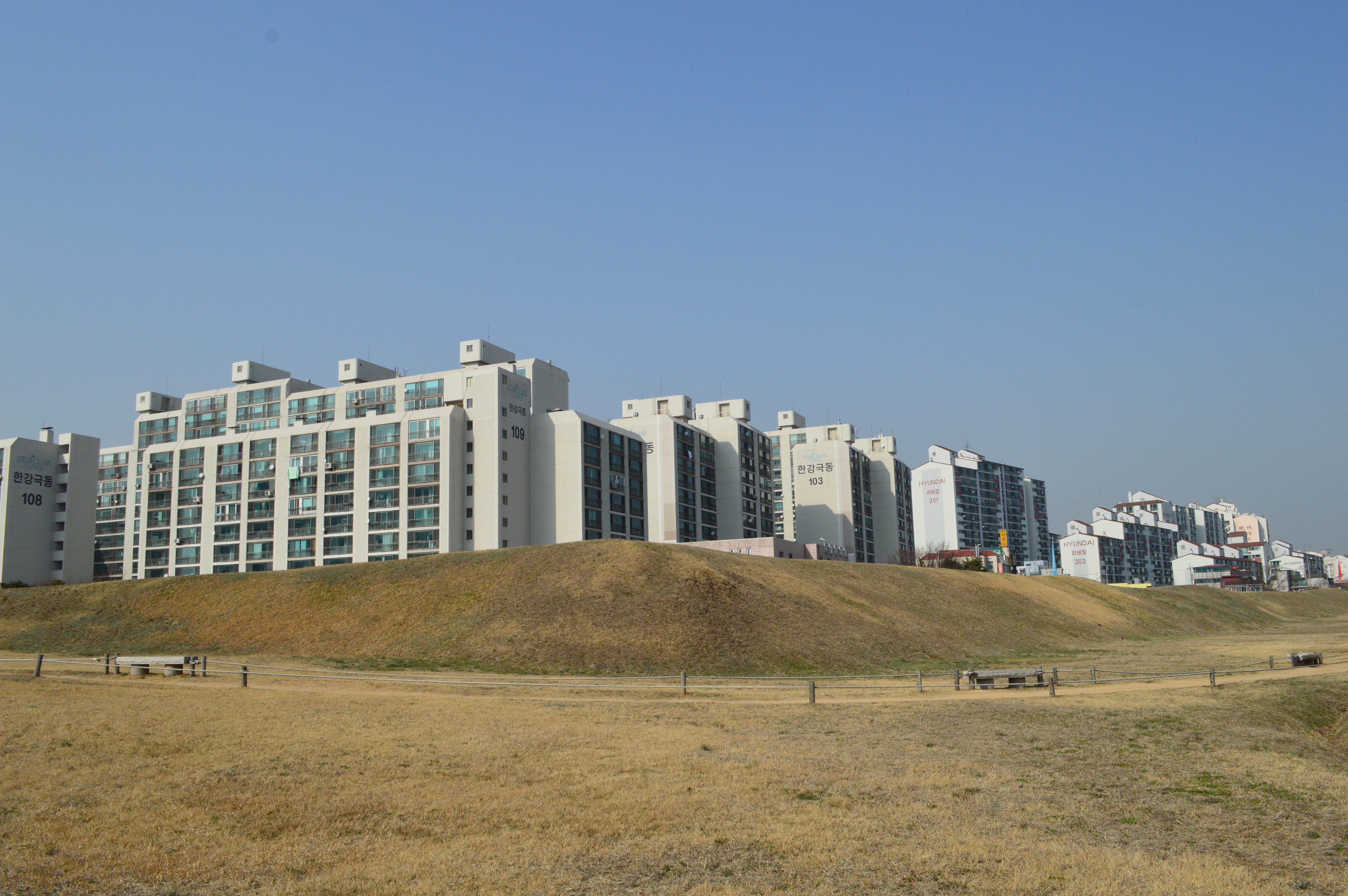 風納土城 土塁